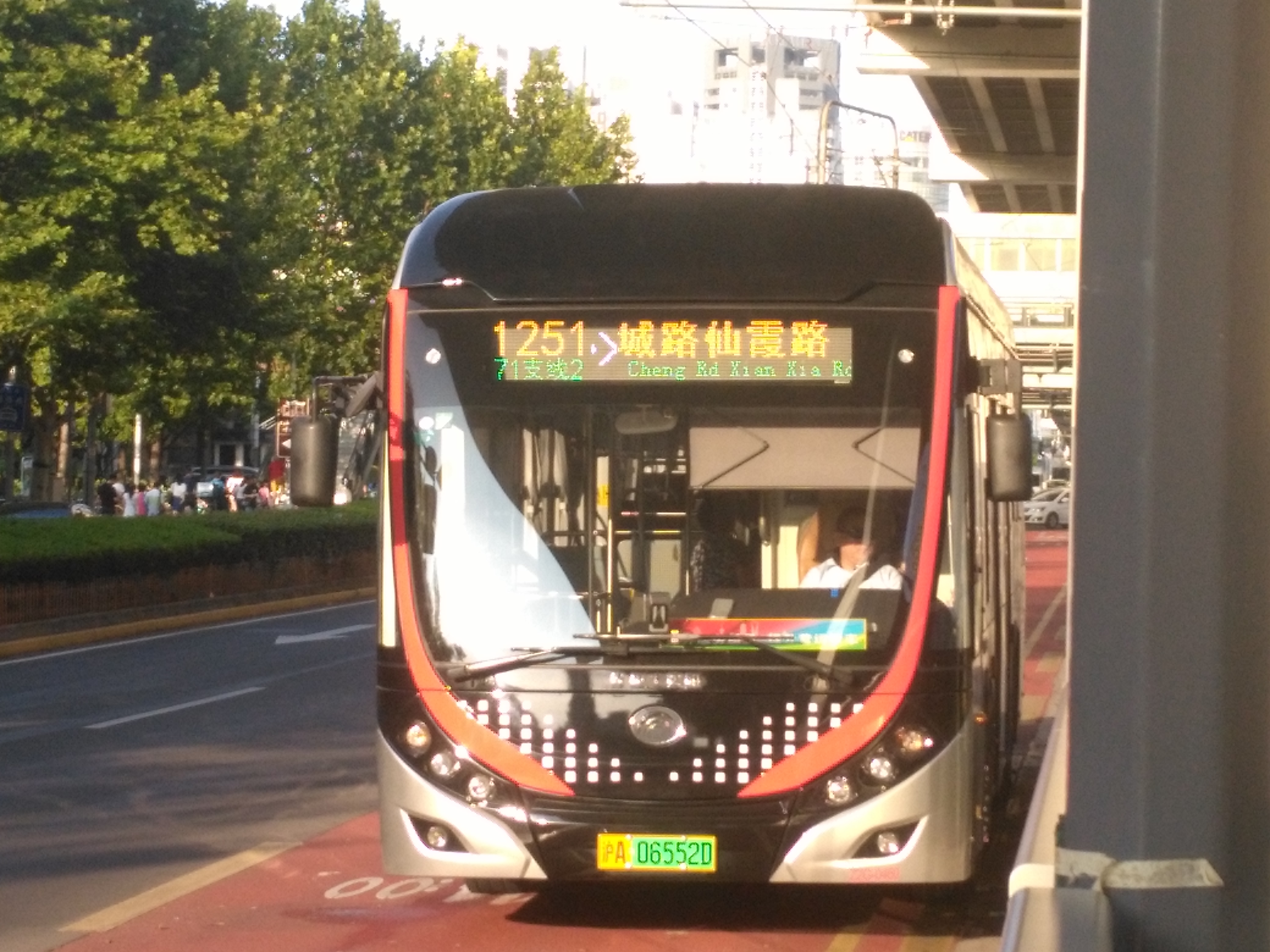 上海公交1251路（71路支线2）正在进入凯旋路站，准备开门。